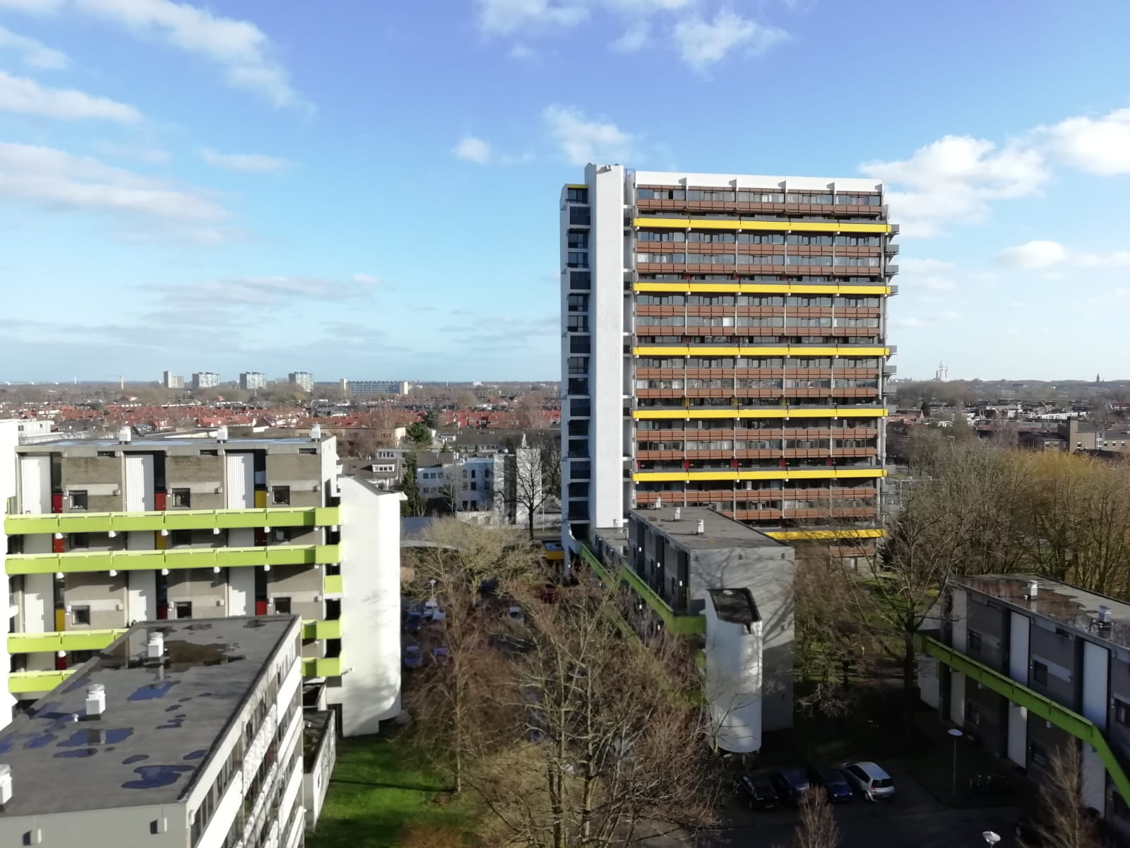 Gele flat en laagbouw op het TWC gezien vanaf de oranje flat.